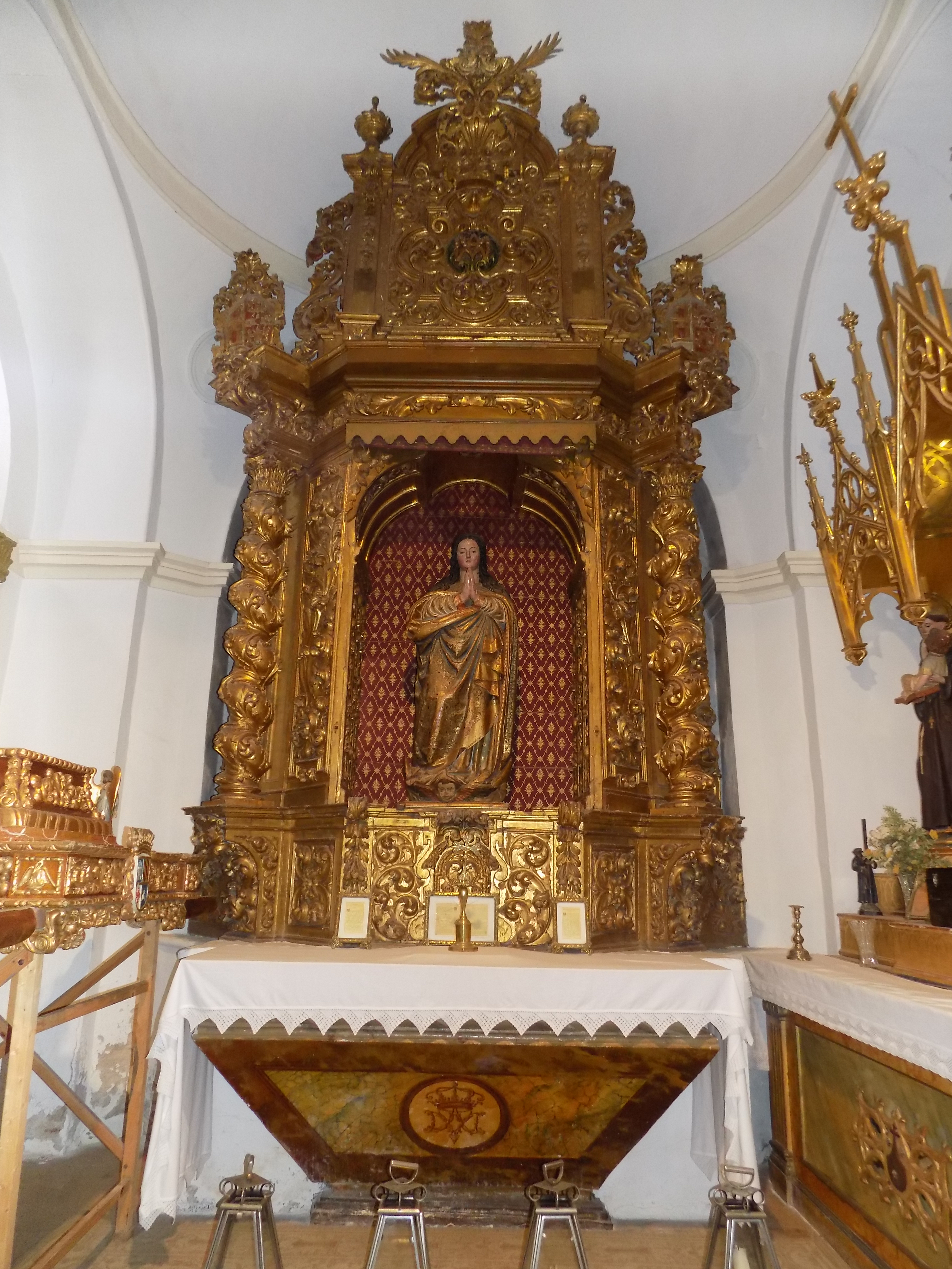 Capilla de la Inmaculada Concepción de la iglesia de Nuestra Señora del Castillo de Fuente Obejuna, provincia de Córdoba, (España).